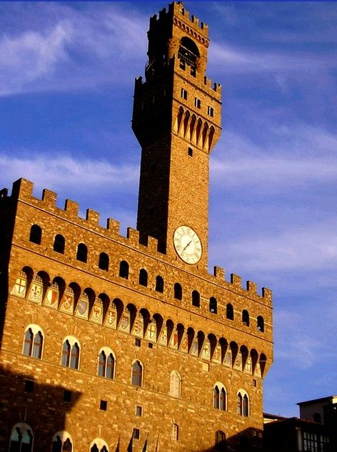 The Palazzo Vecchio in Firenze, Italy